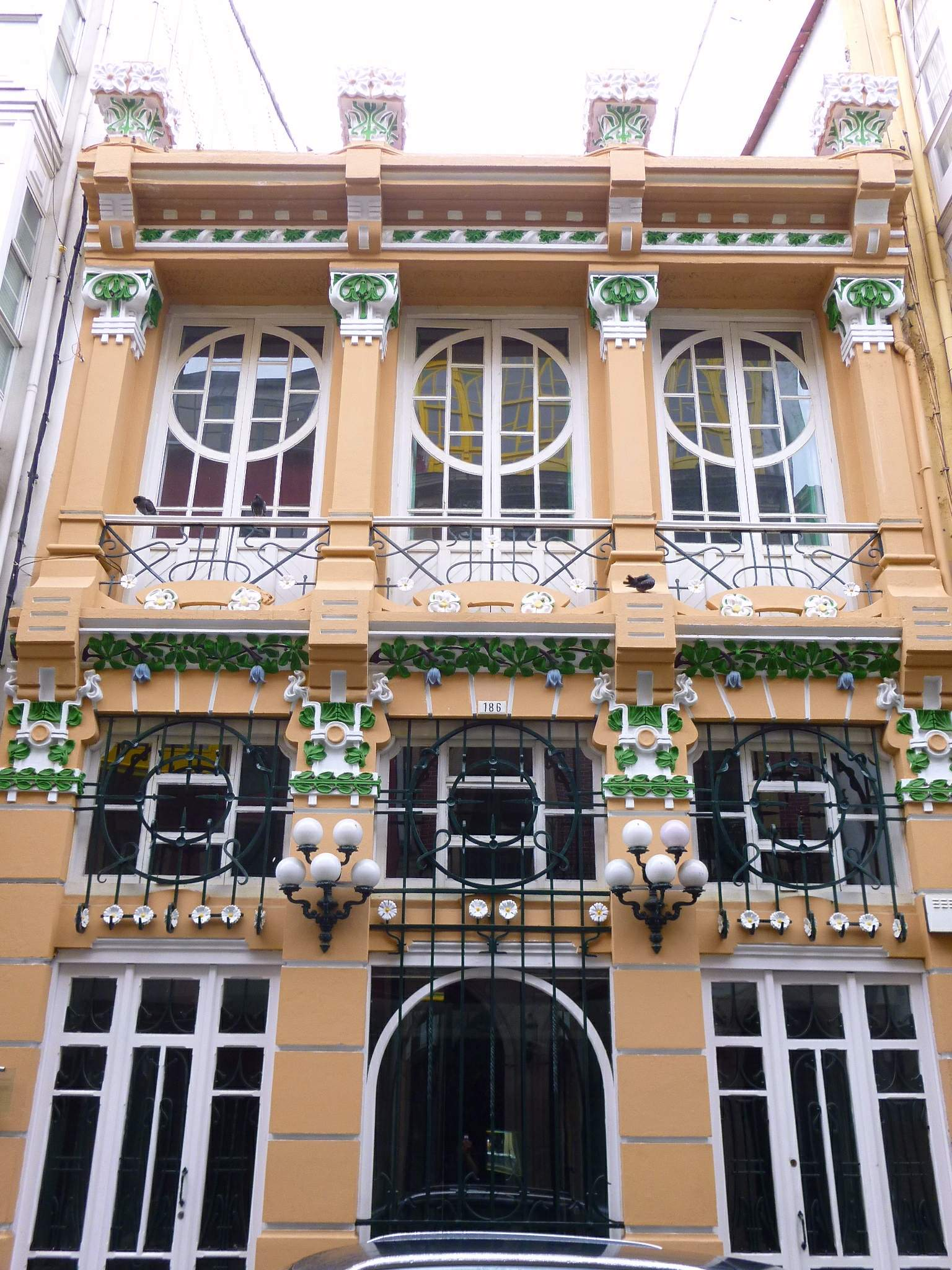 Ferrol - Barrio de La Magdalena - Imprenta do Correo Gallego